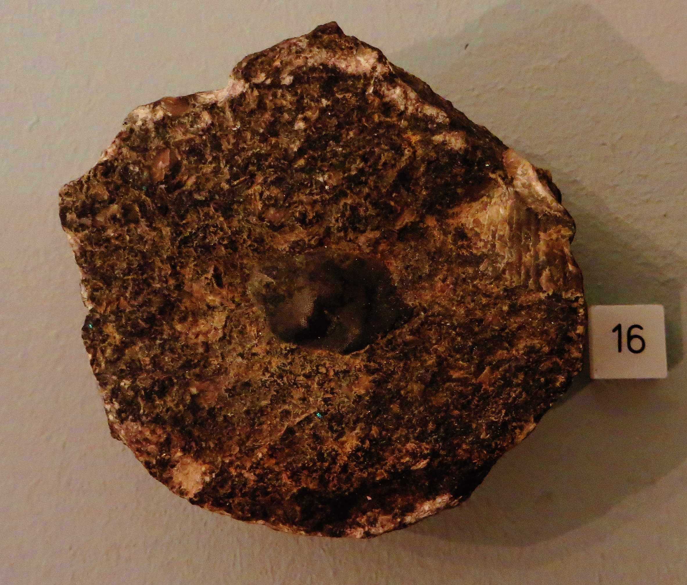 Fossil of Helodus, an extinct fish- Took the picture at Museum of Paleontology, Tubingen